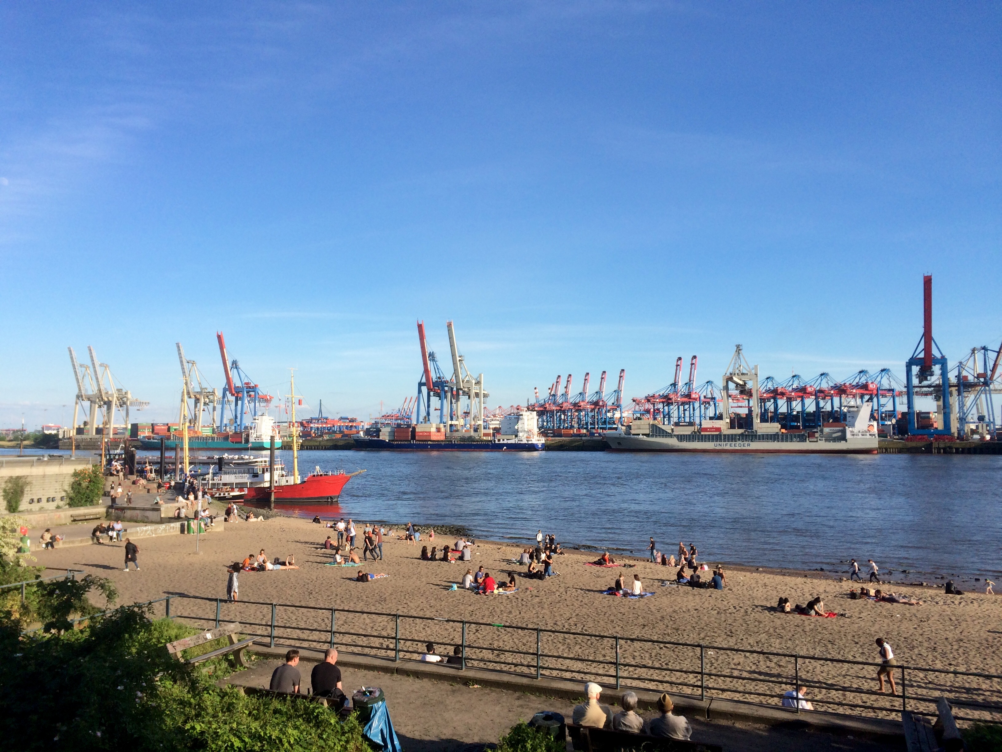 Elbstrand in Hamburg-Övelgönne